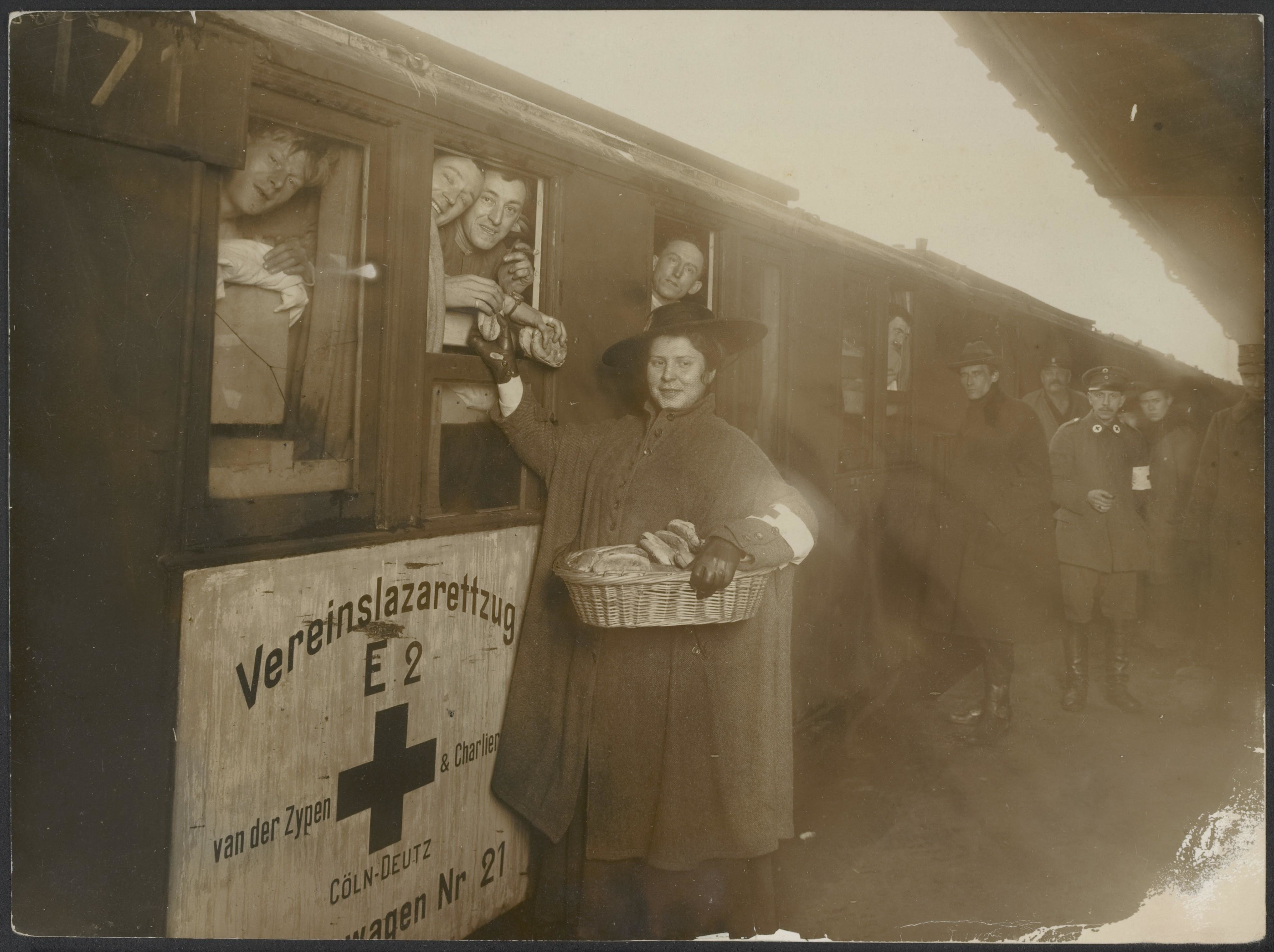 Collectie / Archief : Fotocollectie Eerste Wereldoorlog Reportage / Serie : [ onbekend ] Beschrijving : "Aankomst der Engelschen te Roozendaal". Annotatie : Treinwagon, "Vereinslazarettzug" van de firma van der Zijpen & Charlier uit Keulen-Deutz; Nederlandse Rode Kruismedewerkster deelt brood uit. Lachende Engelse soldaten hangen uit de ramen. Datum : 2 januari 1918 (volgens dit blog Locatie : Nederland, Roosendaal Trefwoorden : burgers, eerste wereldoorlog, militairen, spoorwegen Fotograaf : N.V. Vereenigde Fotobureaux Auteursrechthebbende : Materiaalsoort : Foto (zwart/wit) Nummer archiefinventaris : bekijk toegang 2.24.09 Bestanddeelnummer : 158-2106